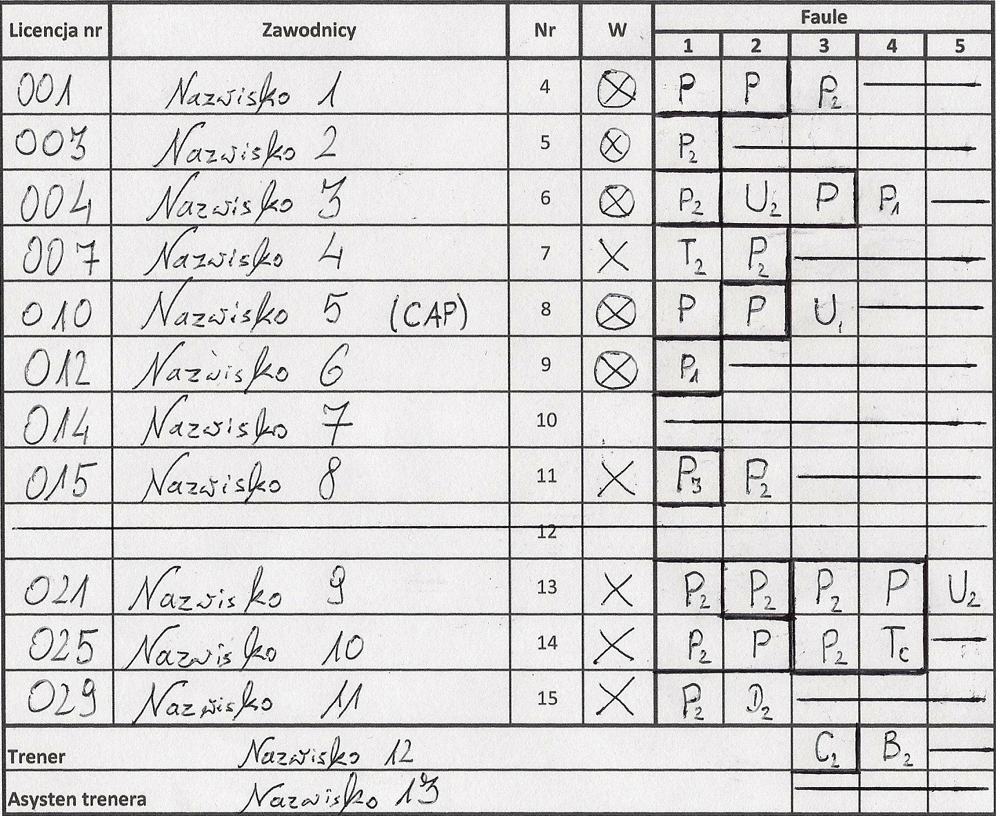 Zawodnicy zapisani w protokole FIBA, wraz z faulami.